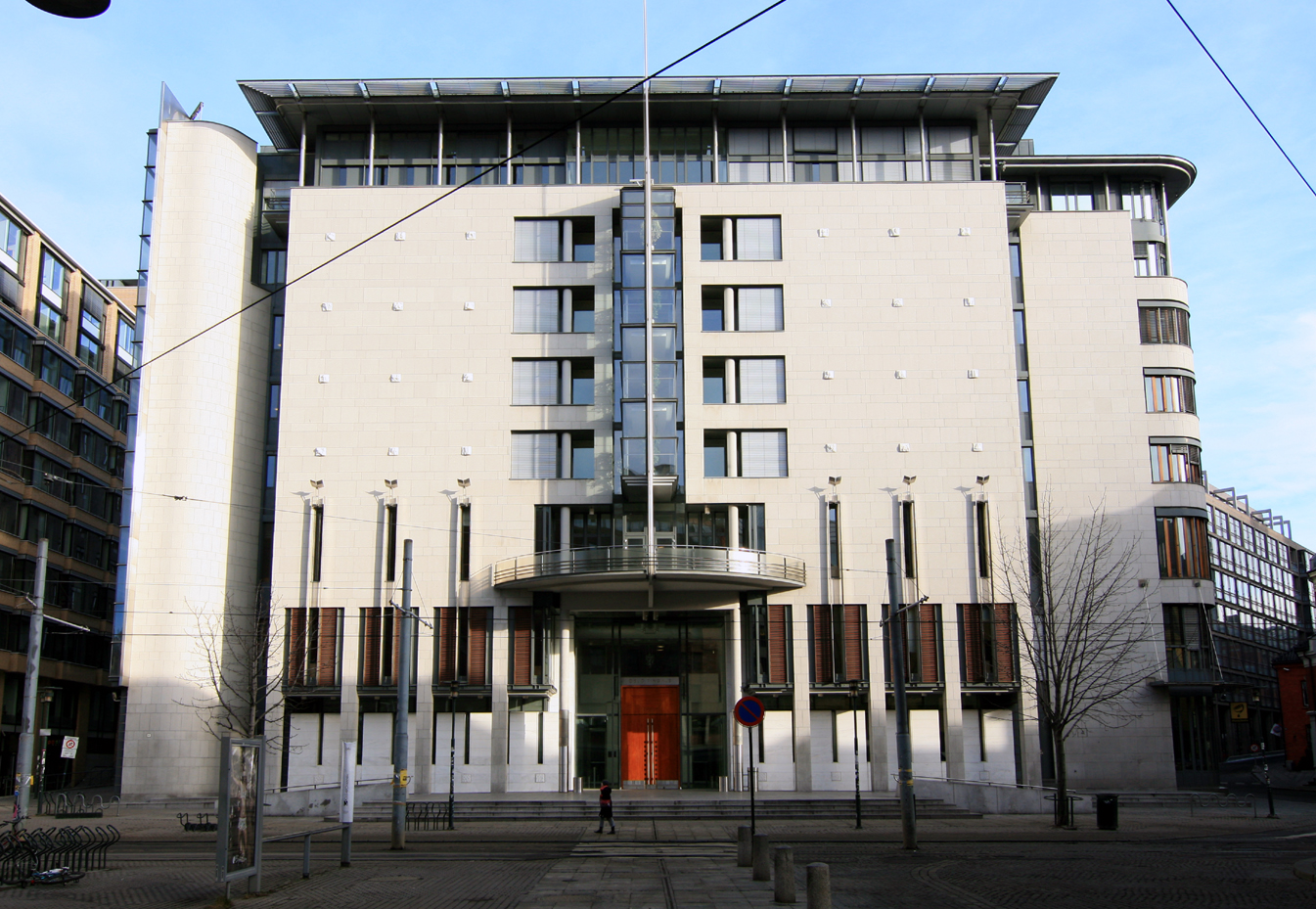 norsk (bokmål): Oslo tinghus. Bygd 1994; Østgaard Arkitekter AS.